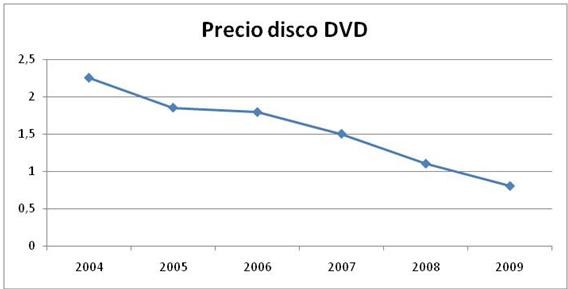 Gráfica con la evolución de los precios de los discos de DVD